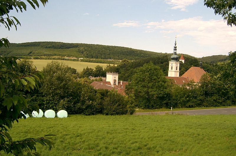 Sicht auf Heiligenkreuz von Alland kommend - im Hintergrund die Wiener Außenringautobahn A21. Fotografiert am 5.7. 2004 von mir selbst